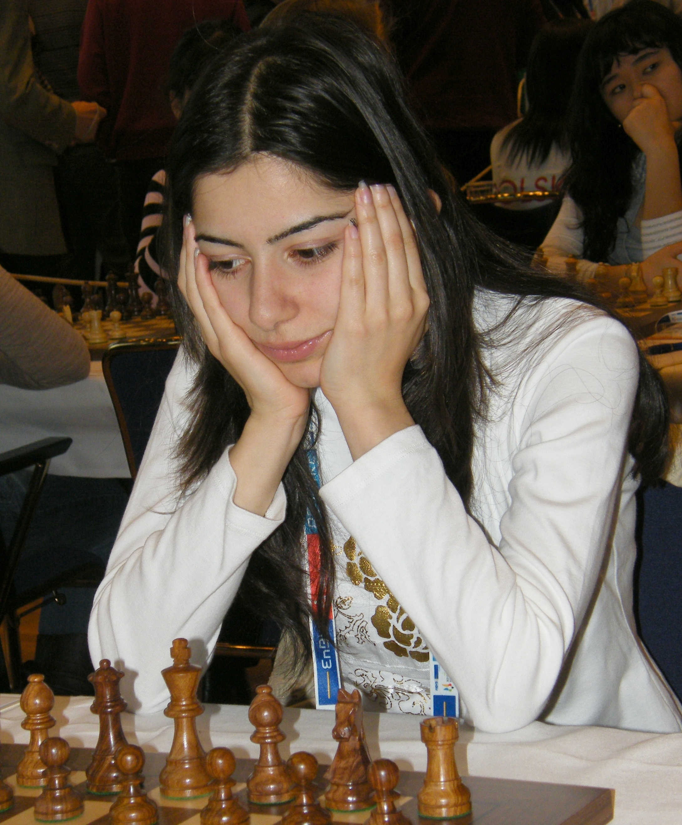 Lilit Mkrtchian bei der 38. Schacholympiade in Dresden 2008